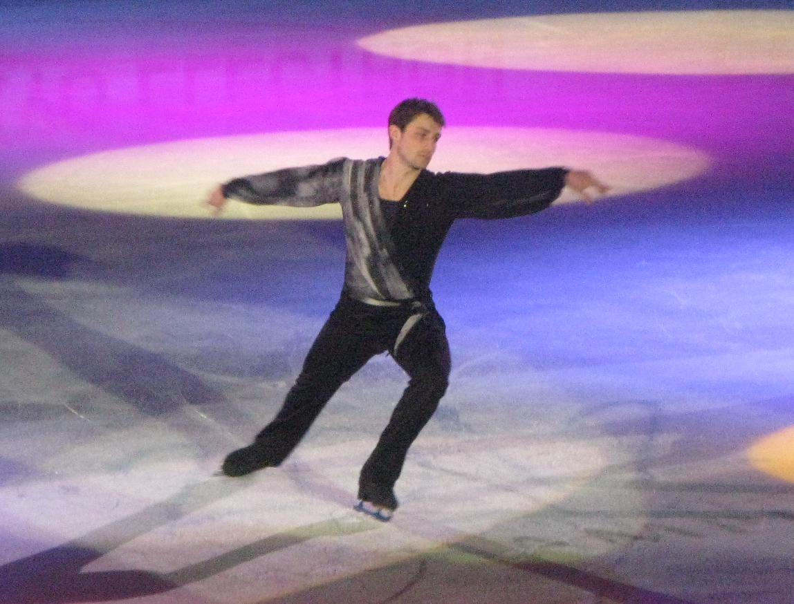 Brian Joubert au gala des Championnats du monde de patinage artistique 2012 à Nice.